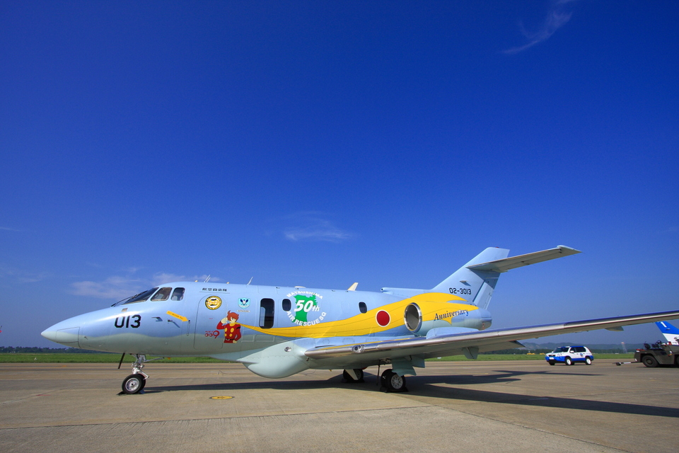 航空自衛隊松島基地航空祭で地上展示された､航空自衛隊松島救難隊のU-125A 松島救難隊創設５０周年記念塗装機